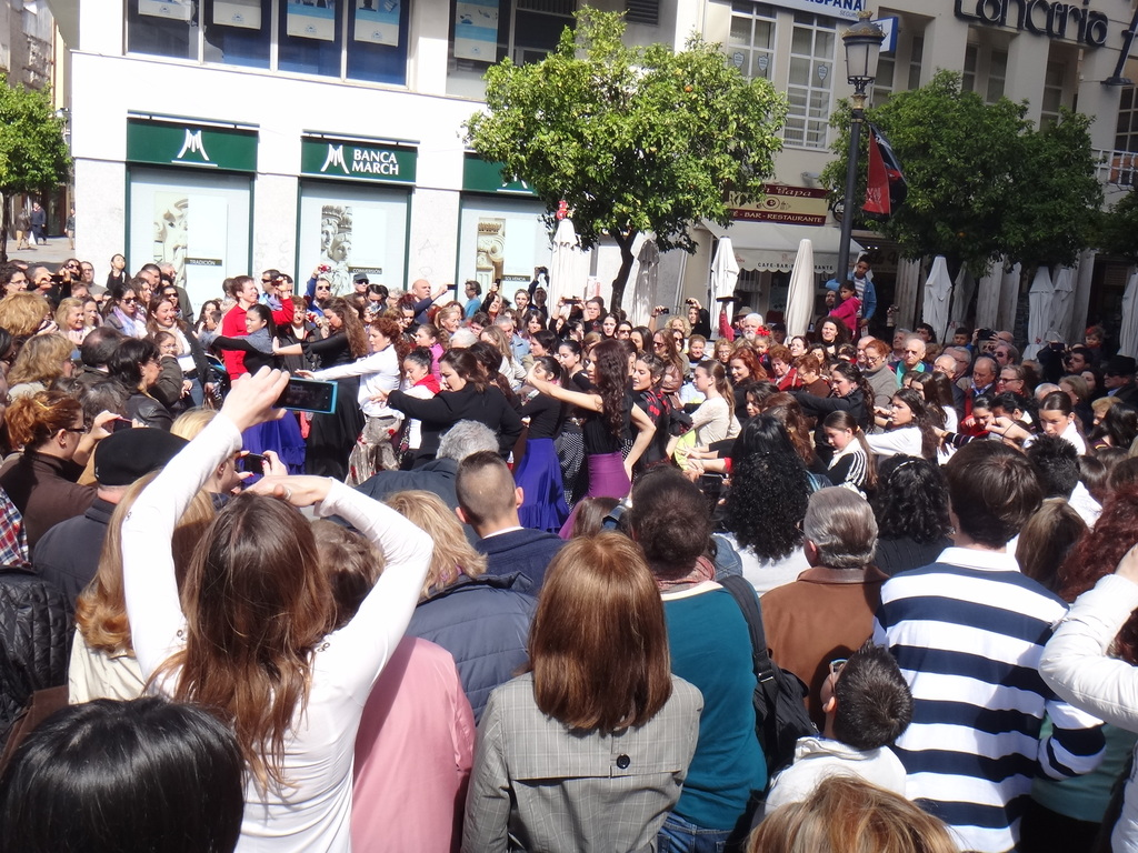 Flamenco Flash Mob en el Festival de Flamenco de Jerez, liderado por María del Mar Moreno